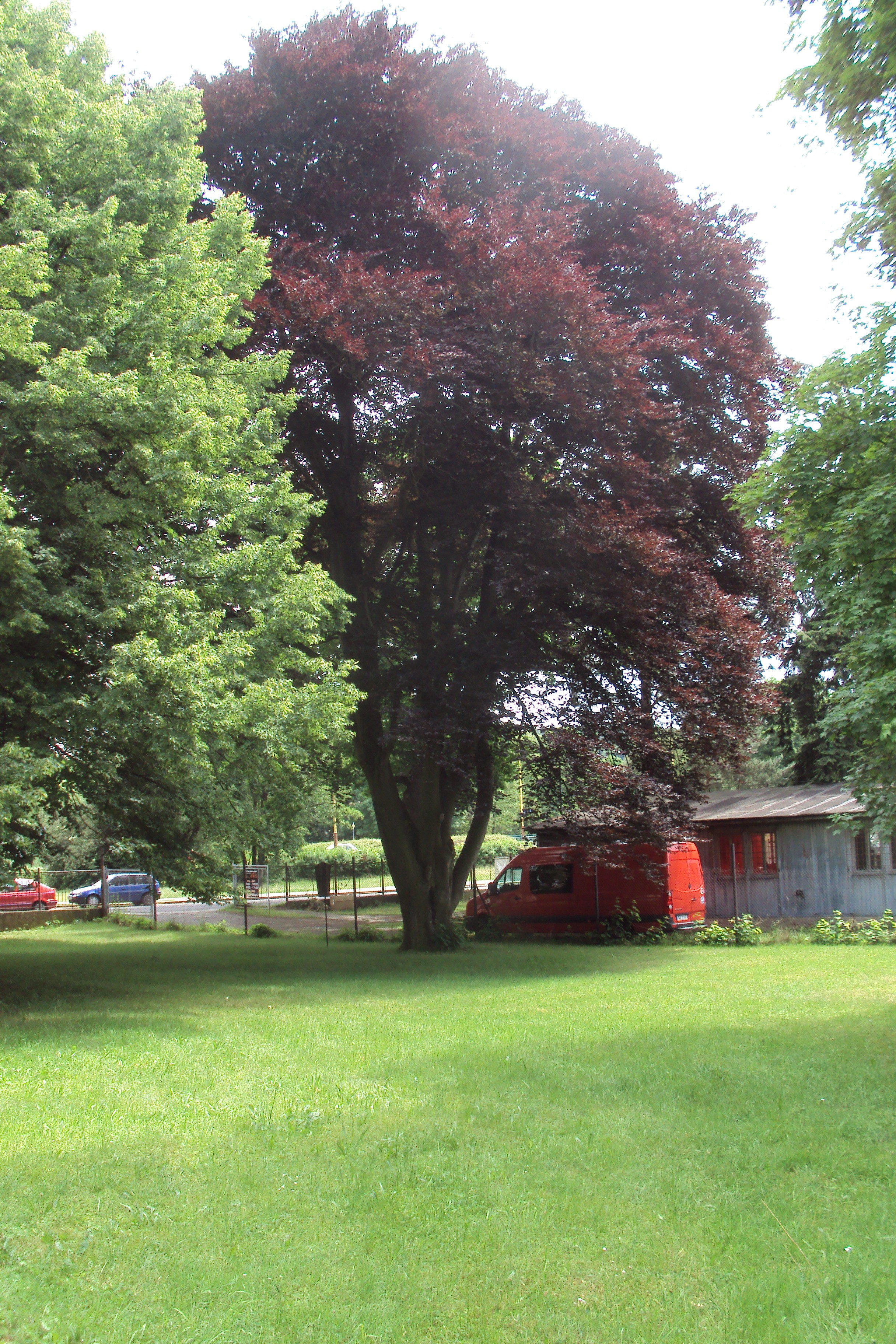 Památný buk lesní v České Lípě, tentokrát ze dvora poblíž Moskevské ulice